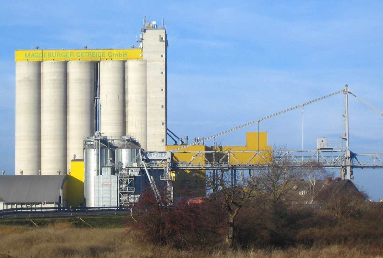 grain silo in Magdeburg, Germany / Getreidesilo in Magdeburg